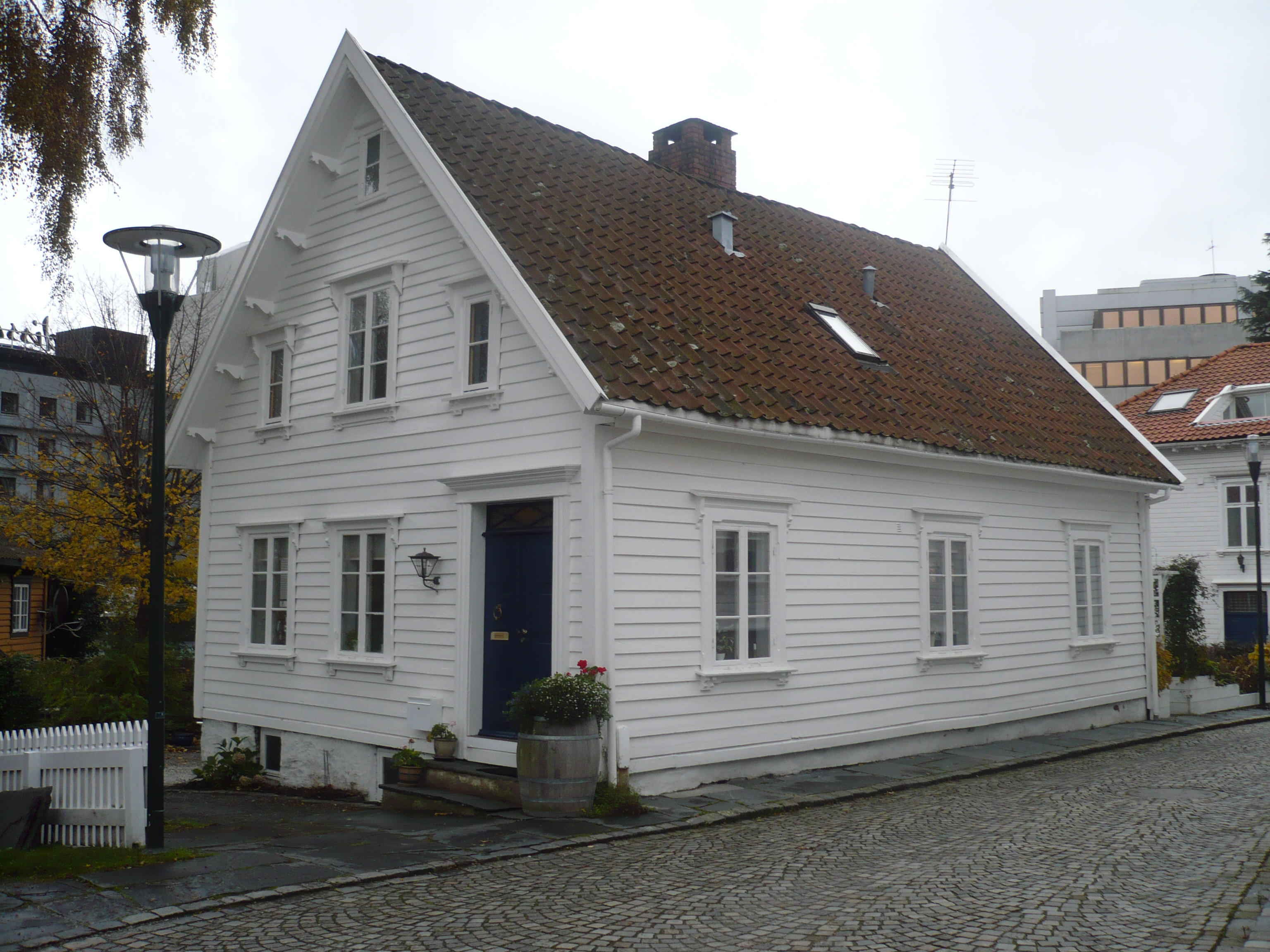 Hus i Øvre Klevegate i Olavskleivå i Stavanger.